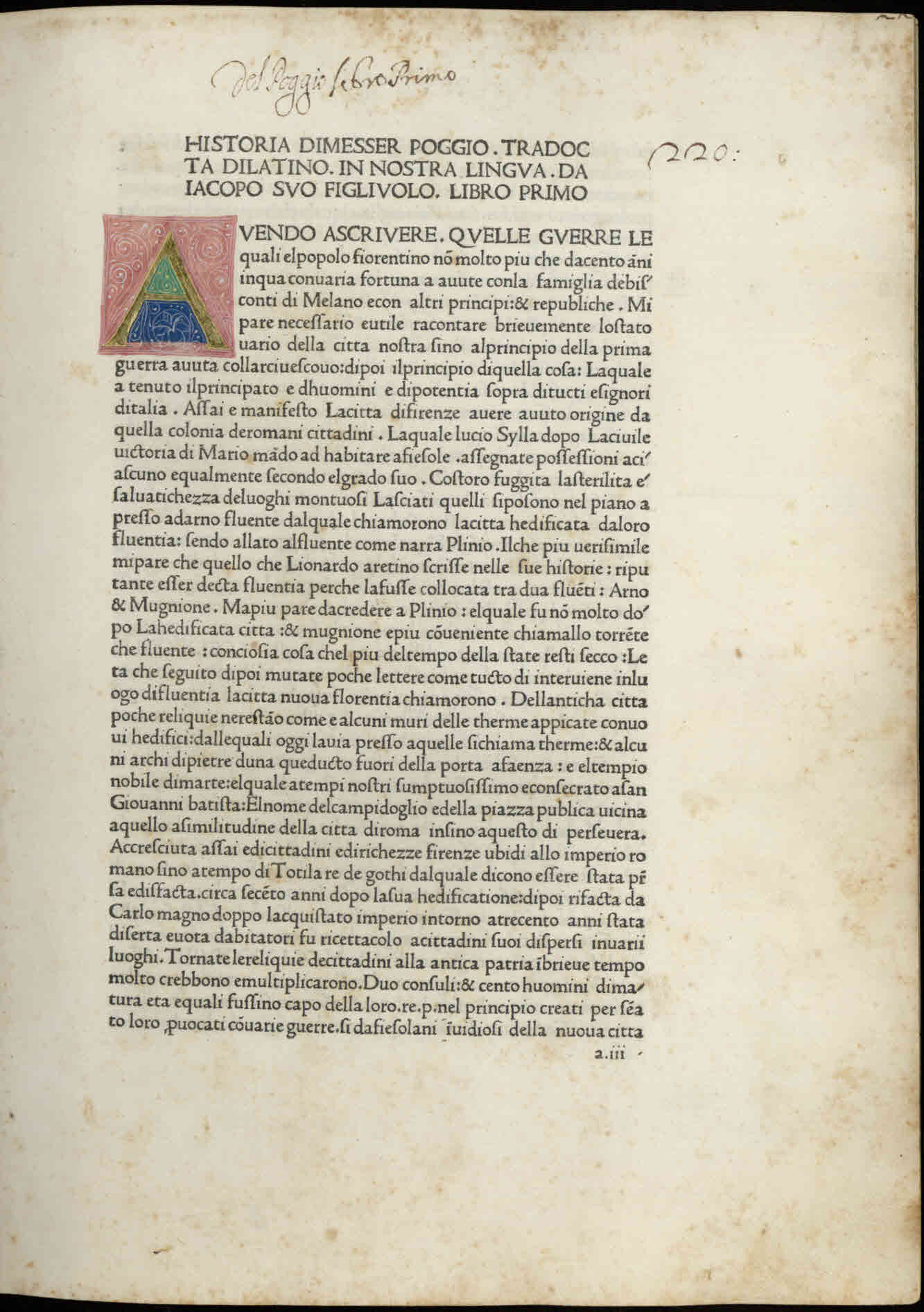 Historia Florentina. - Impresso Avinegia : per lhuomo di optimo ingegnio maestro Jacopo de Rossi di natione gallo, neli anni di Cristo MCCCCLXXVI a octo di marzo. - 116 c. ; a¹⁰, b-c⁸, d-h¹⁰, i-k⁶, l-m¹⁰, n⁸ ; fol. .